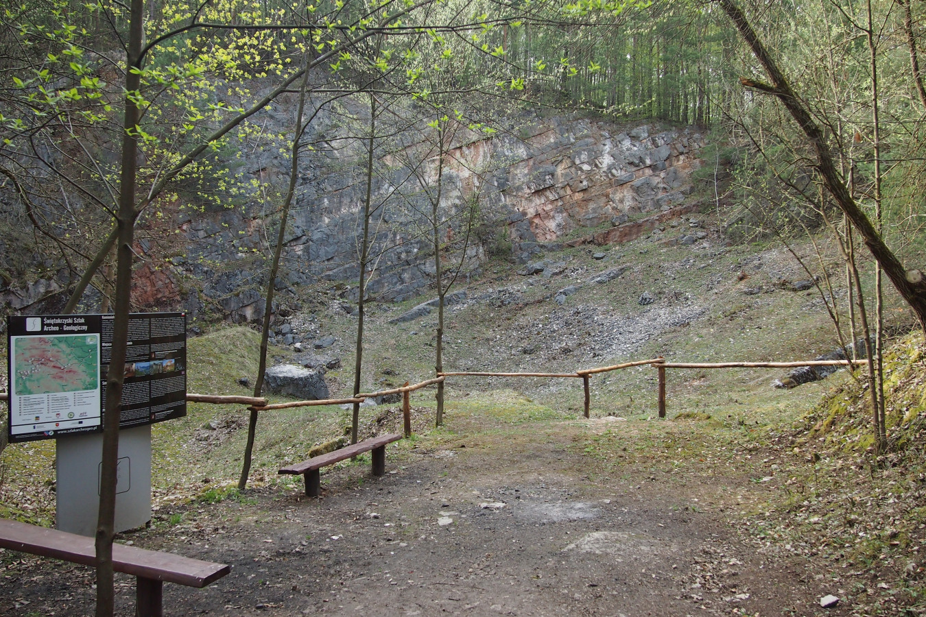 Kamieniołom Szewce na Okrąglicy w Paśmie Bolechowickim